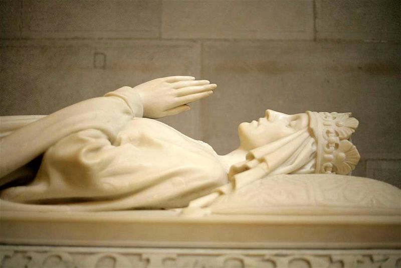 Kraków, Poland Source: Grafika:Jadwiga CP.jpg at the Polish Wikipedia.